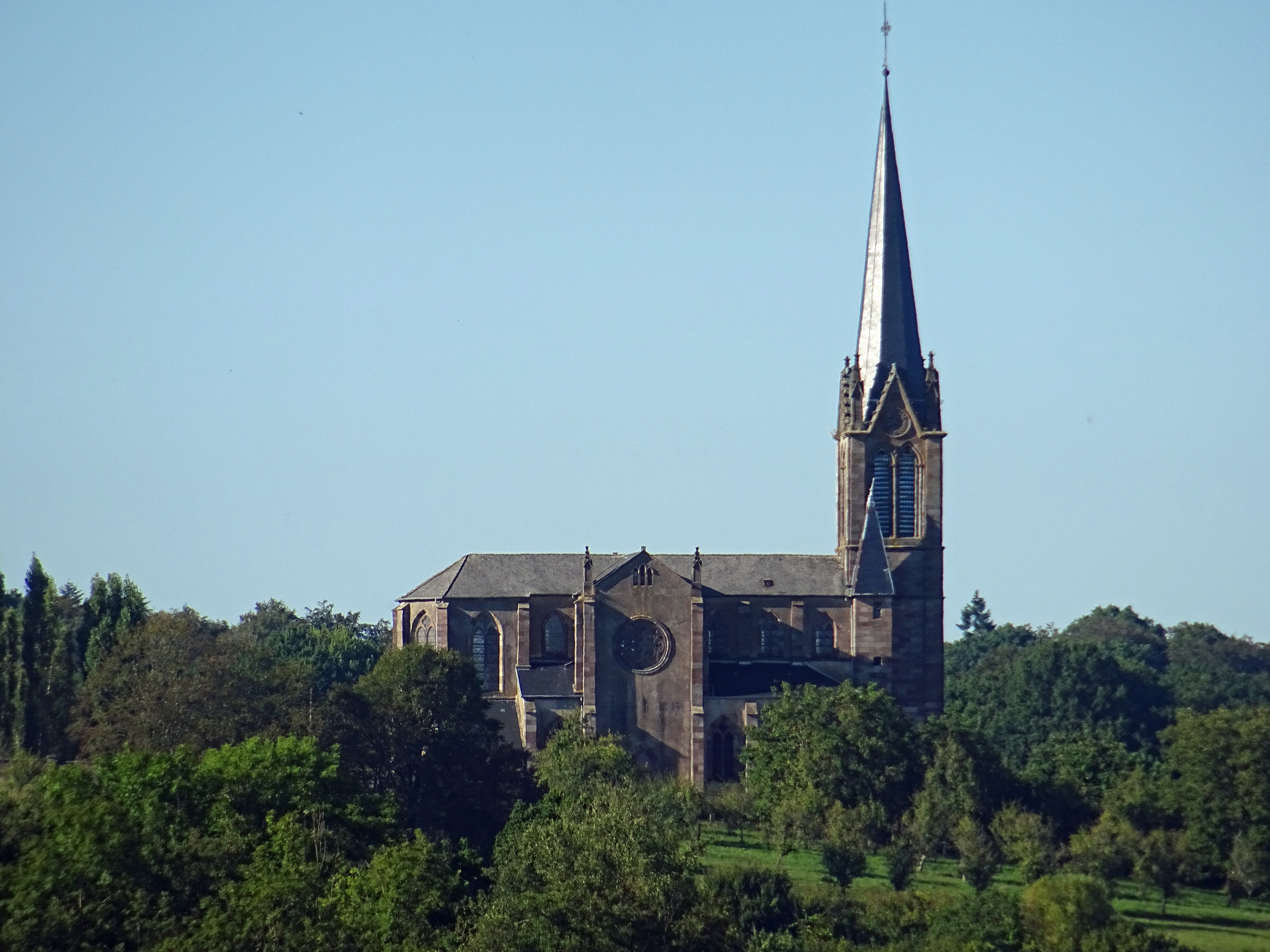 L'église d'Hautevelle.